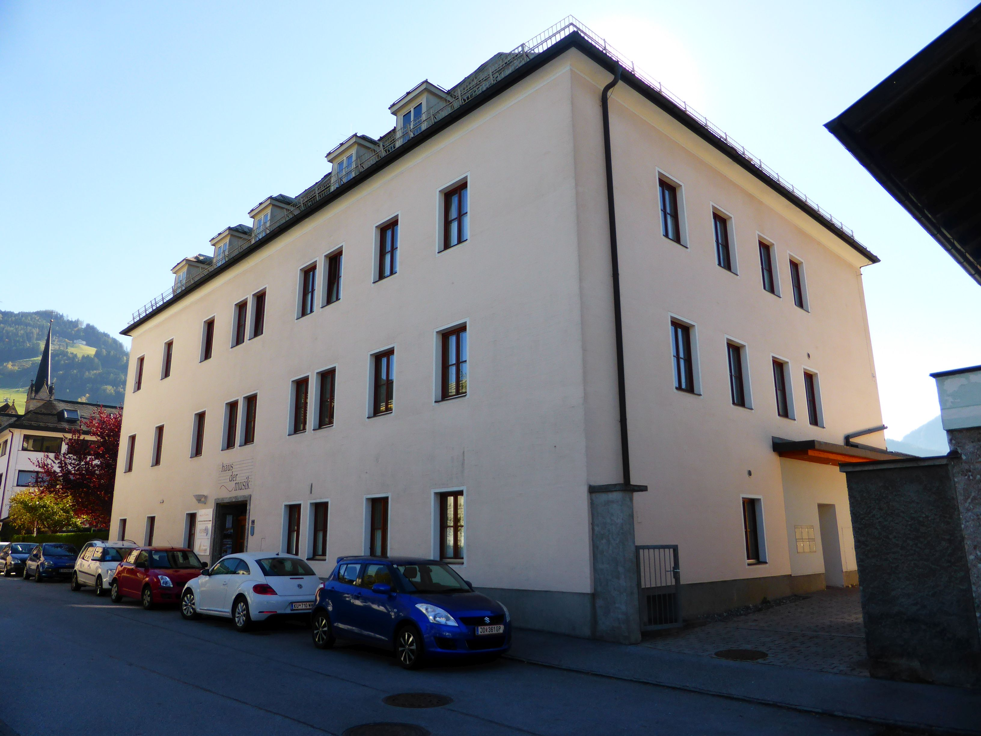 Ehem. Fronfeste von St. Johann im Pongau